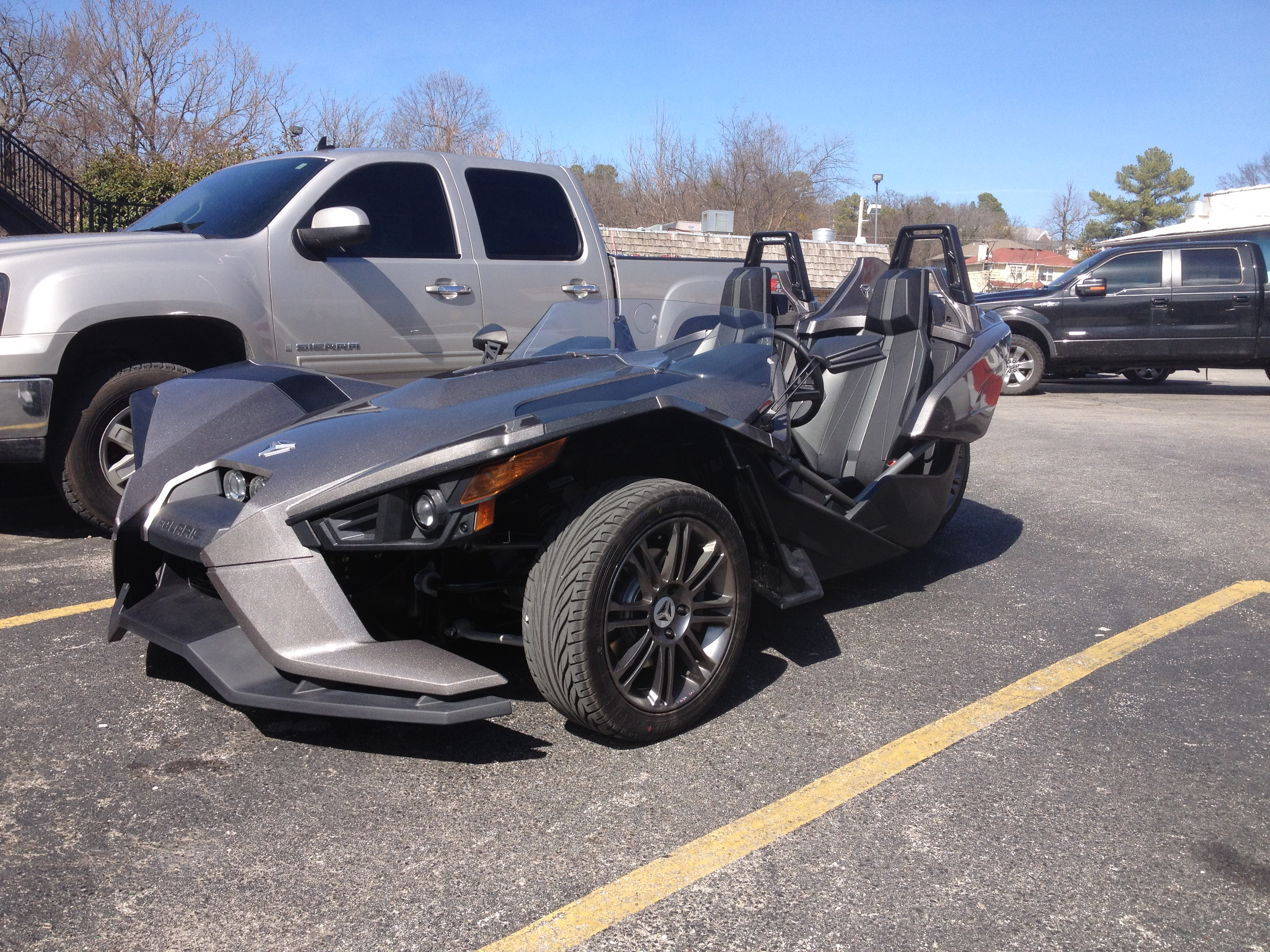 Polaris Slingshot. Fayetteville Arkansas USA.